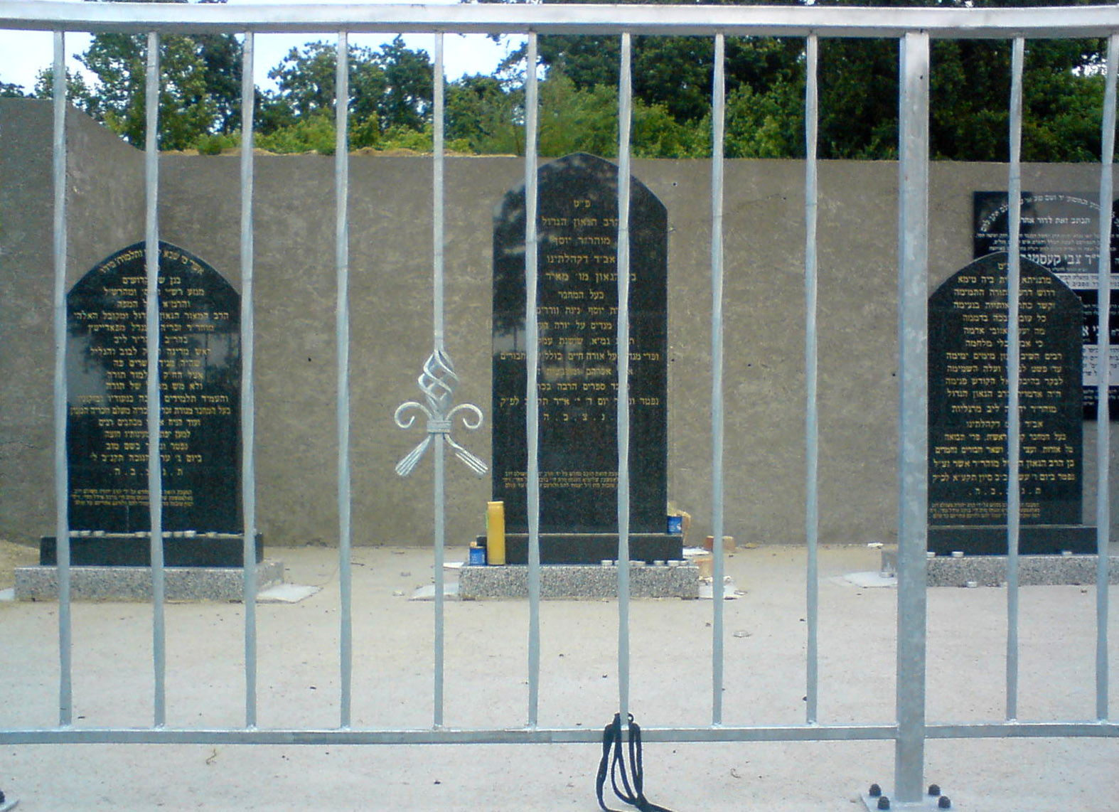 Cmentarz żydowski w Słubicach.